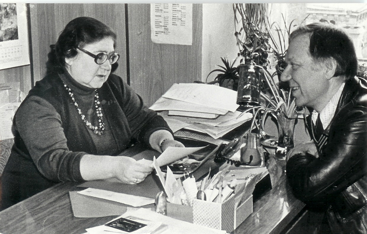 Н.Т.Финогенова с великим клоуном О.К.Поповым